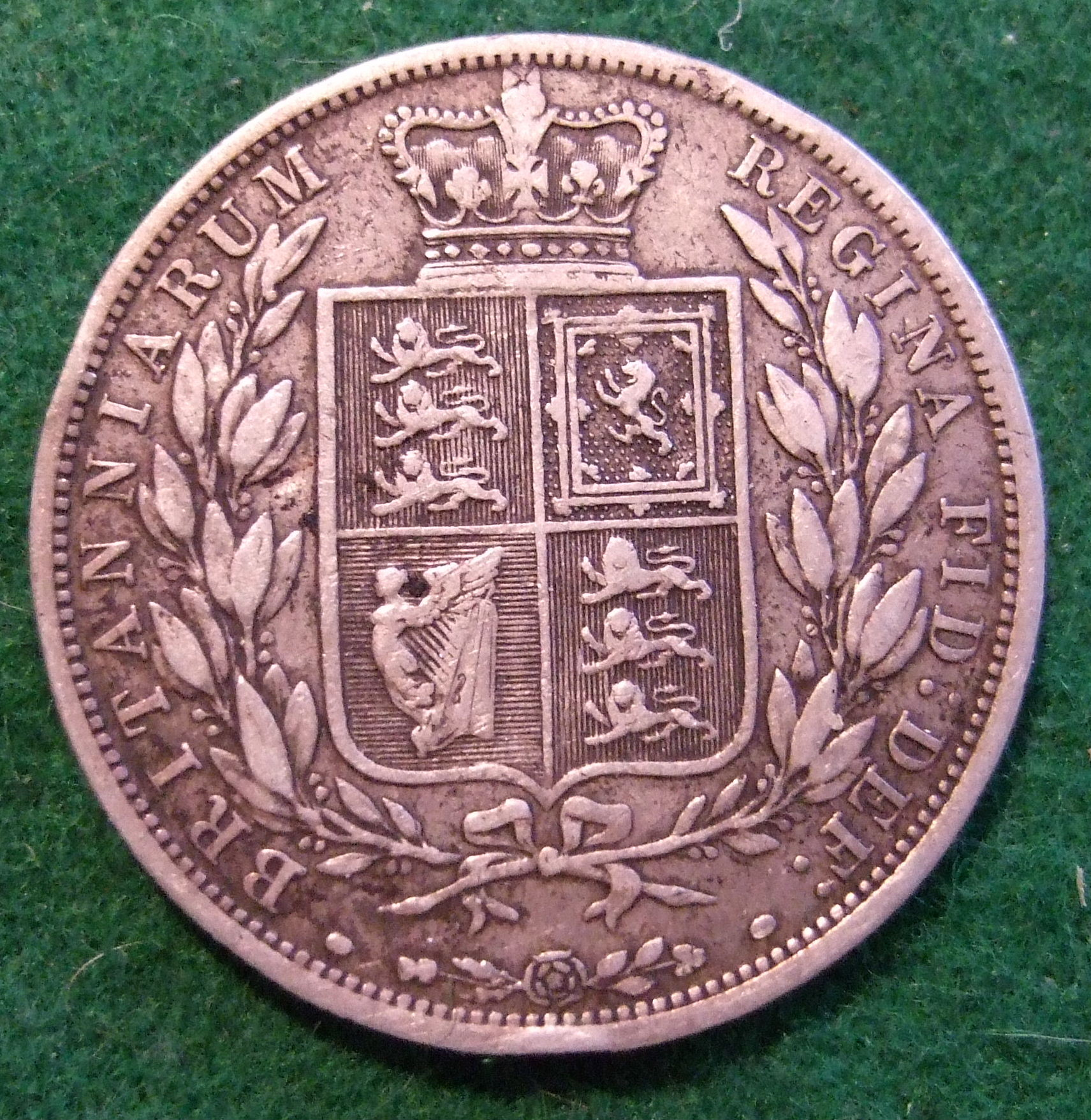 GREAT BRITAIN, QUEEN VICTORIA---1885 HALF CROWN b